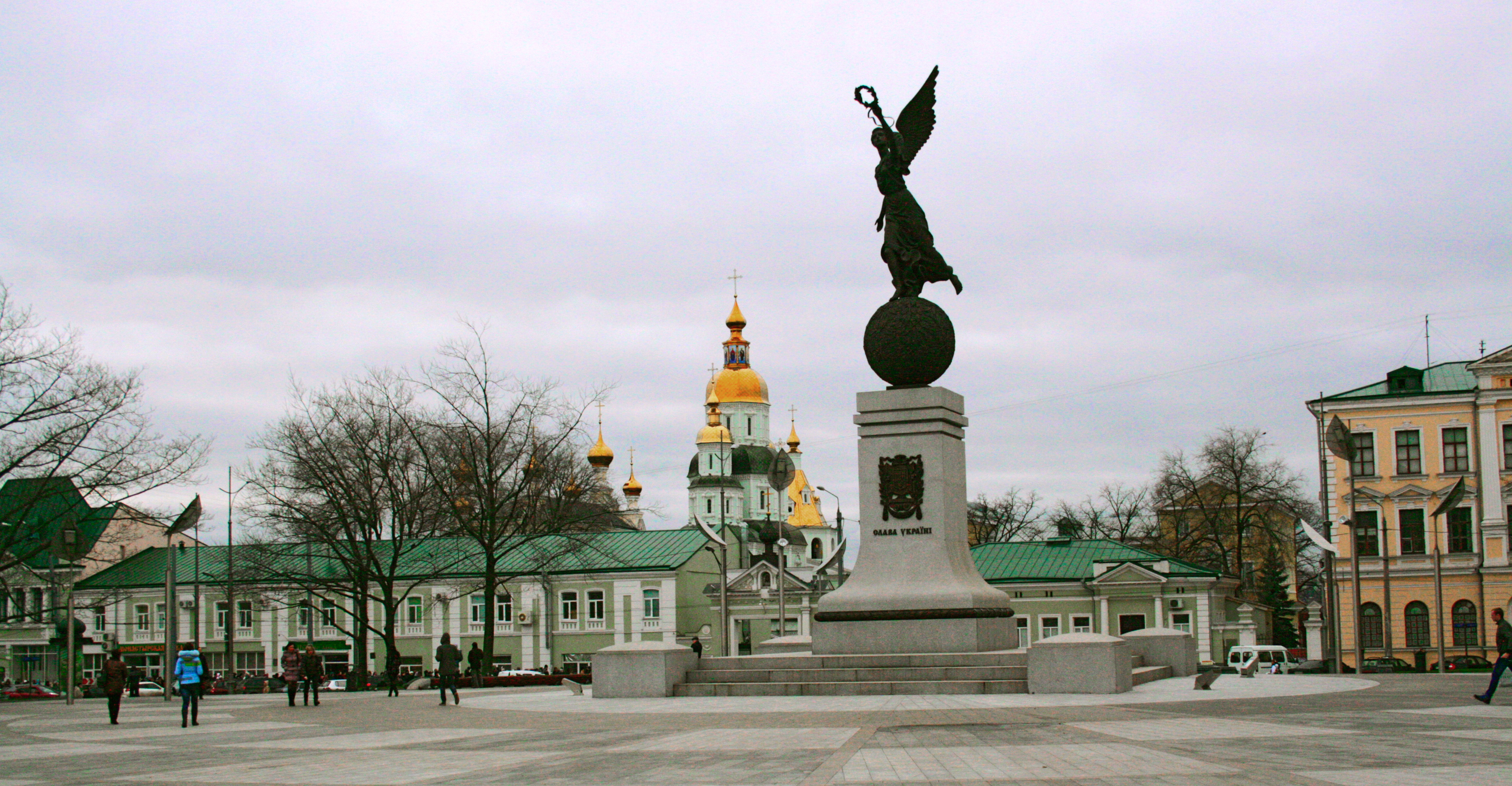 Памятник независимости в Харькове